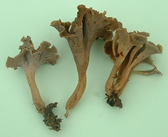 Pseudocraterellus, Gy (Haute-Saône), Octobre 2004